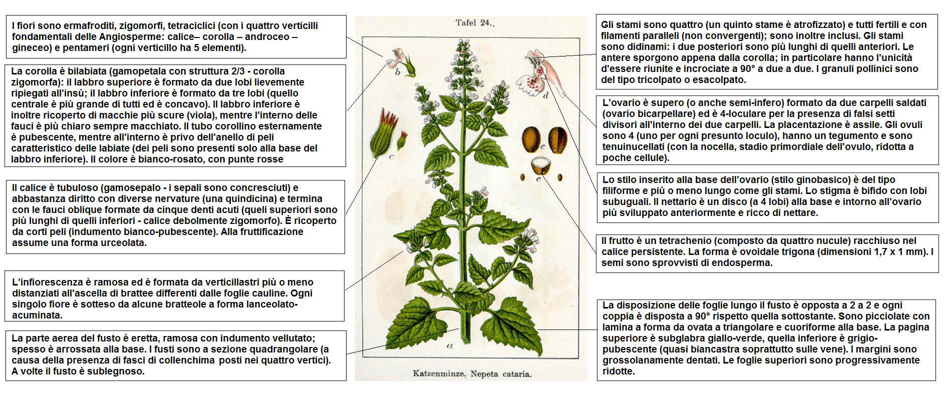 Nepeta cataria - Descrizione della pianta